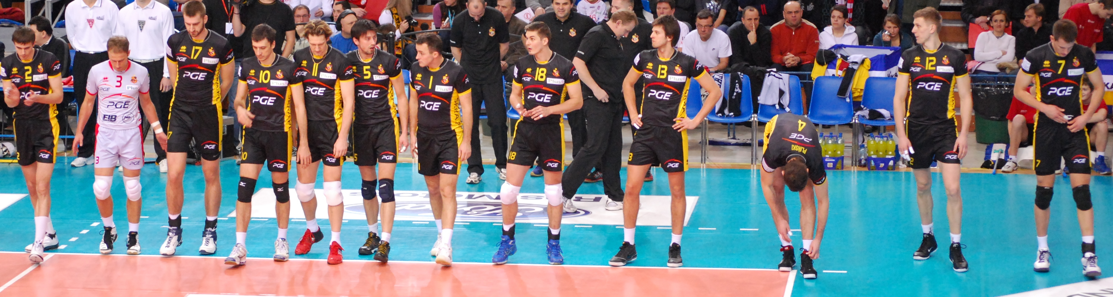 Skra Bełchatów przed meczem z Asseco Resovią Rzeszów w Hali Podpromie